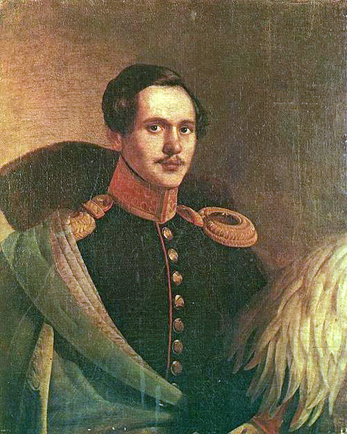 Портрет Михаила Юрьевича Лермонтова.